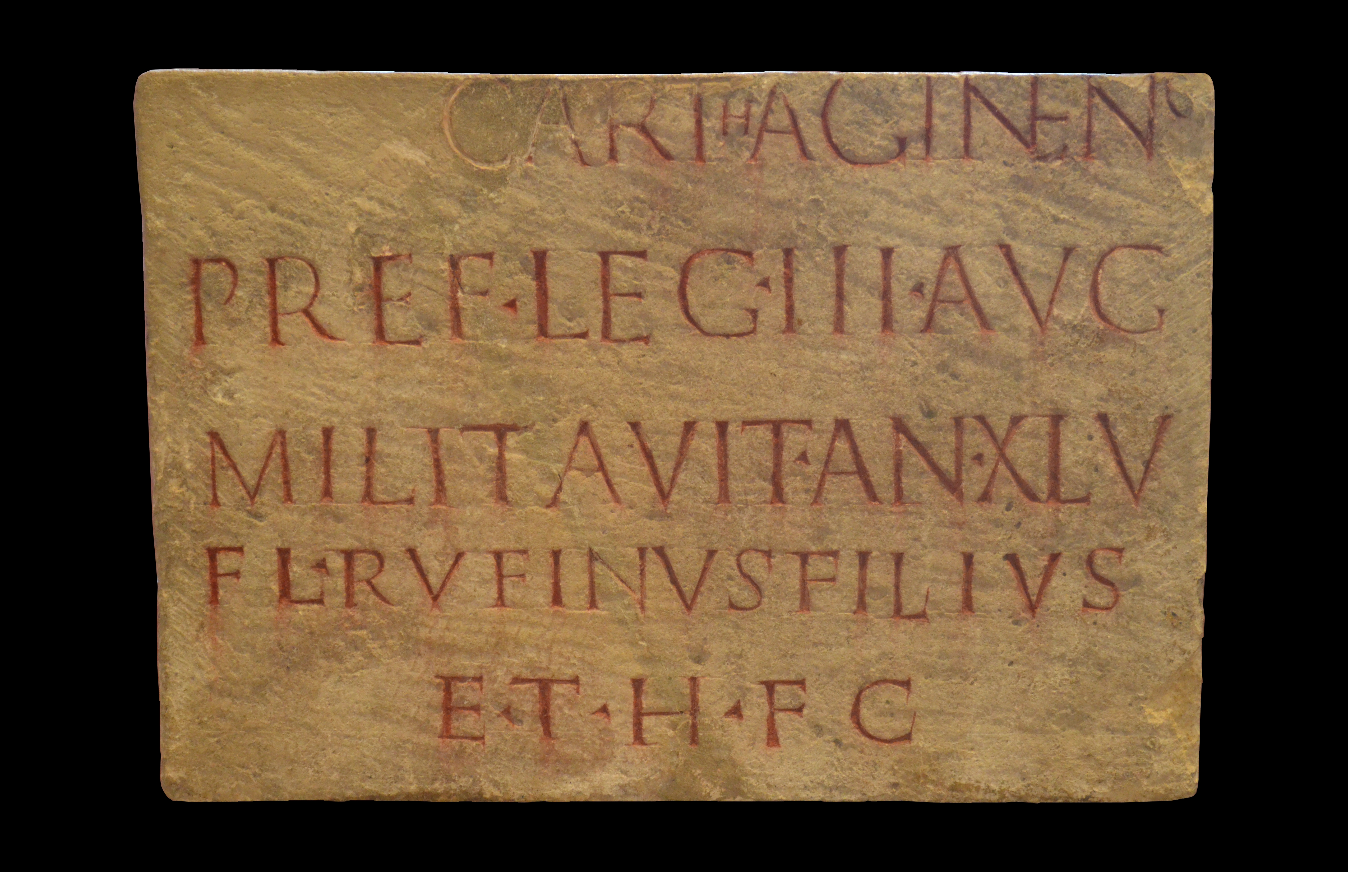 Musée romain-germanique (Cologne) (Römisch-Germanisches Museum (Köln)) - Stèle funéraire d'un officier de la 3e légion Augusta, stationnée à Carthage : [---] / [C]arthaginens(is) / pr(a)ef(ectus) leg(ionis) III Aug(ustae) / militavit an(nos) XLV / Fl(avius) Rufinus filius / et h(eres) f(aciendum) c(uravit). CIL XIII 8269, inv. 29310